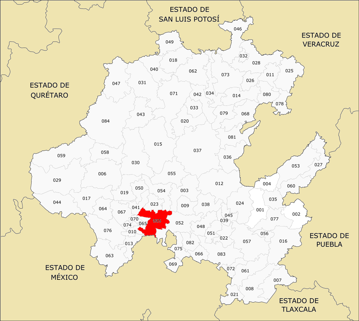 005 Municipios de Hidalgo